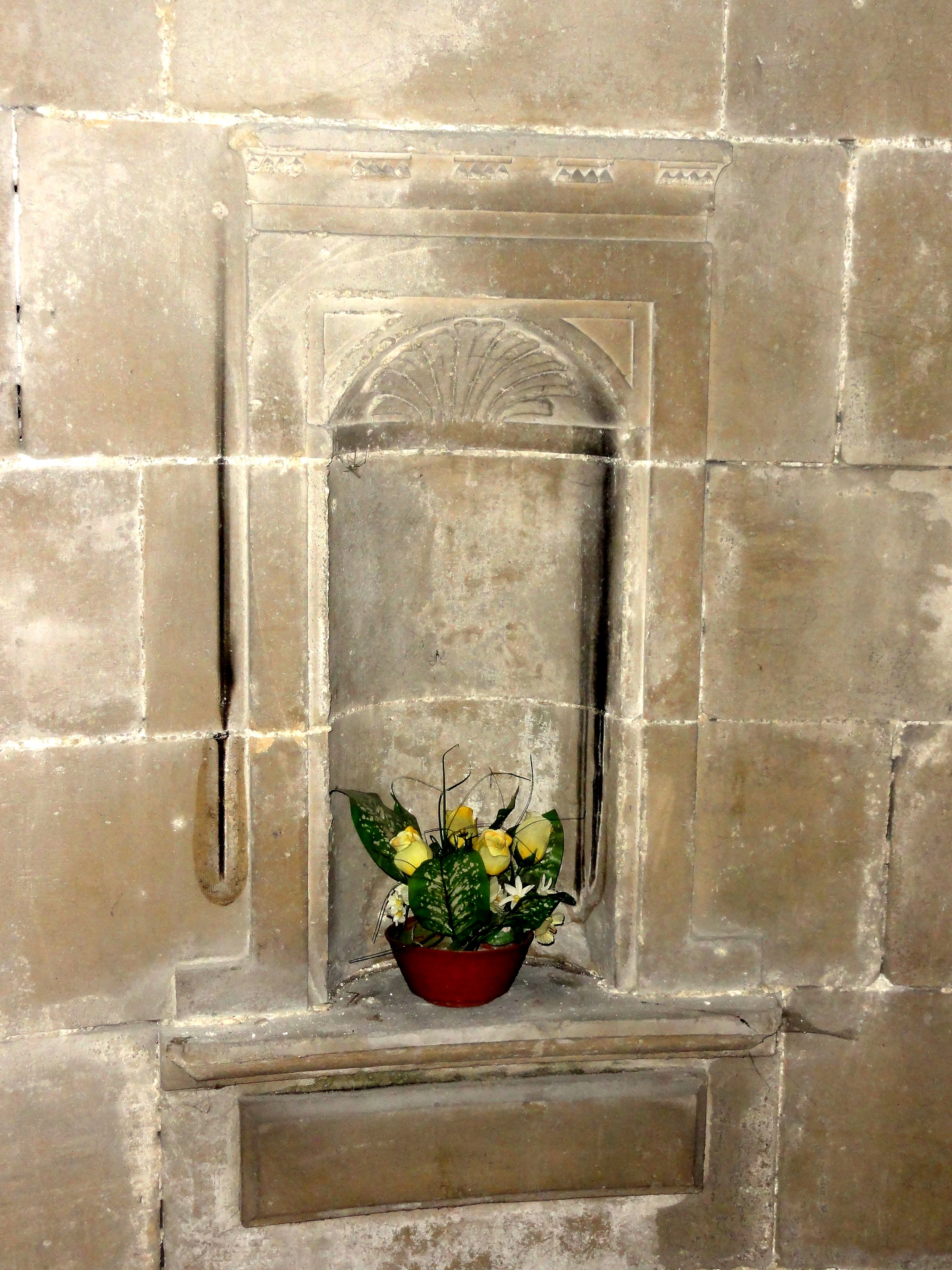 Déambulatoire, piscine des chapelles rayonnantes (toutes sont identiques).